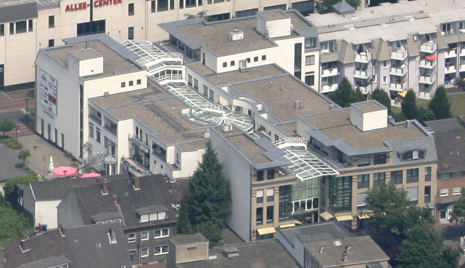 Luftbildaufnahme Hamm